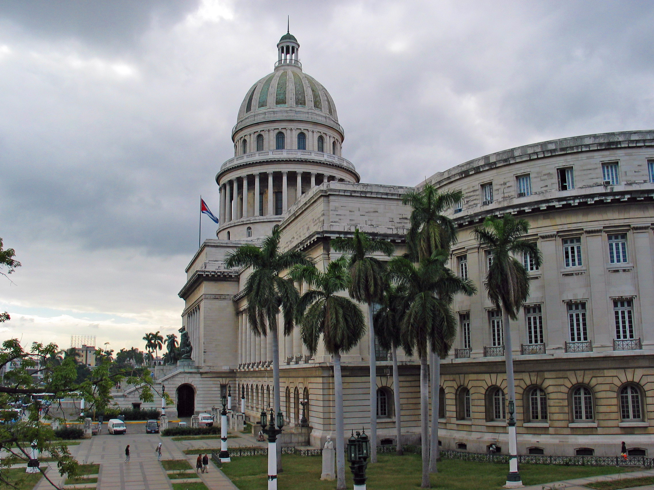 Capitolio in Havana, Cuba